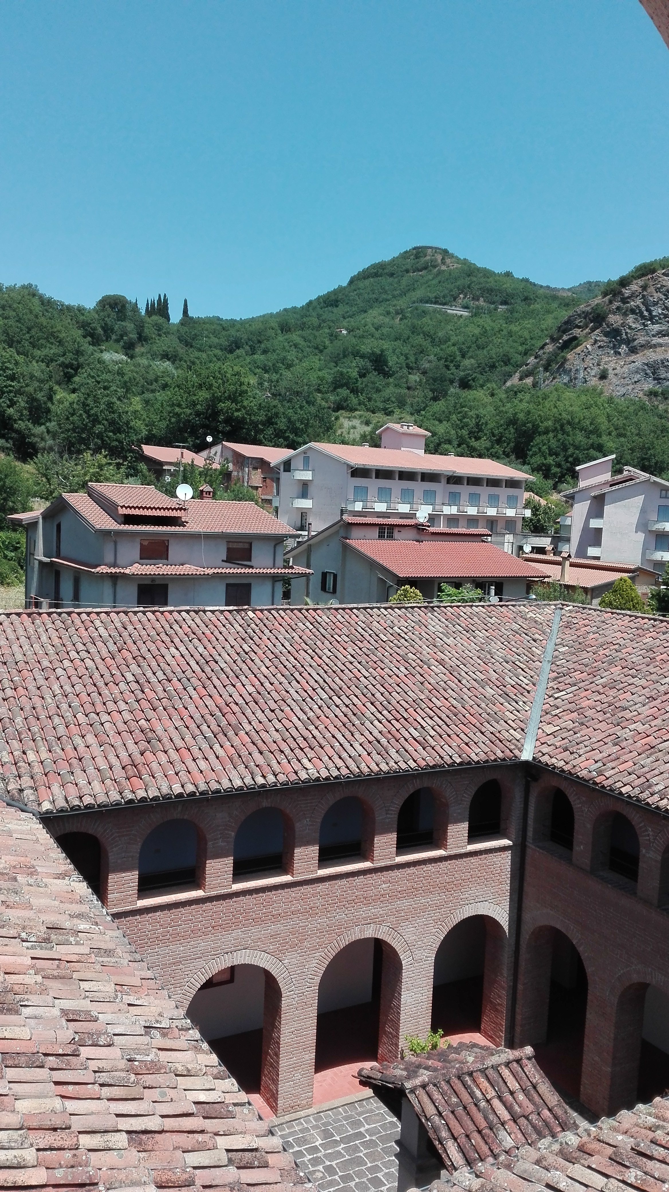 chiostro del Convento di Sant'Antonio This is a photo of a monument which is part of cultural heritage of Italy.